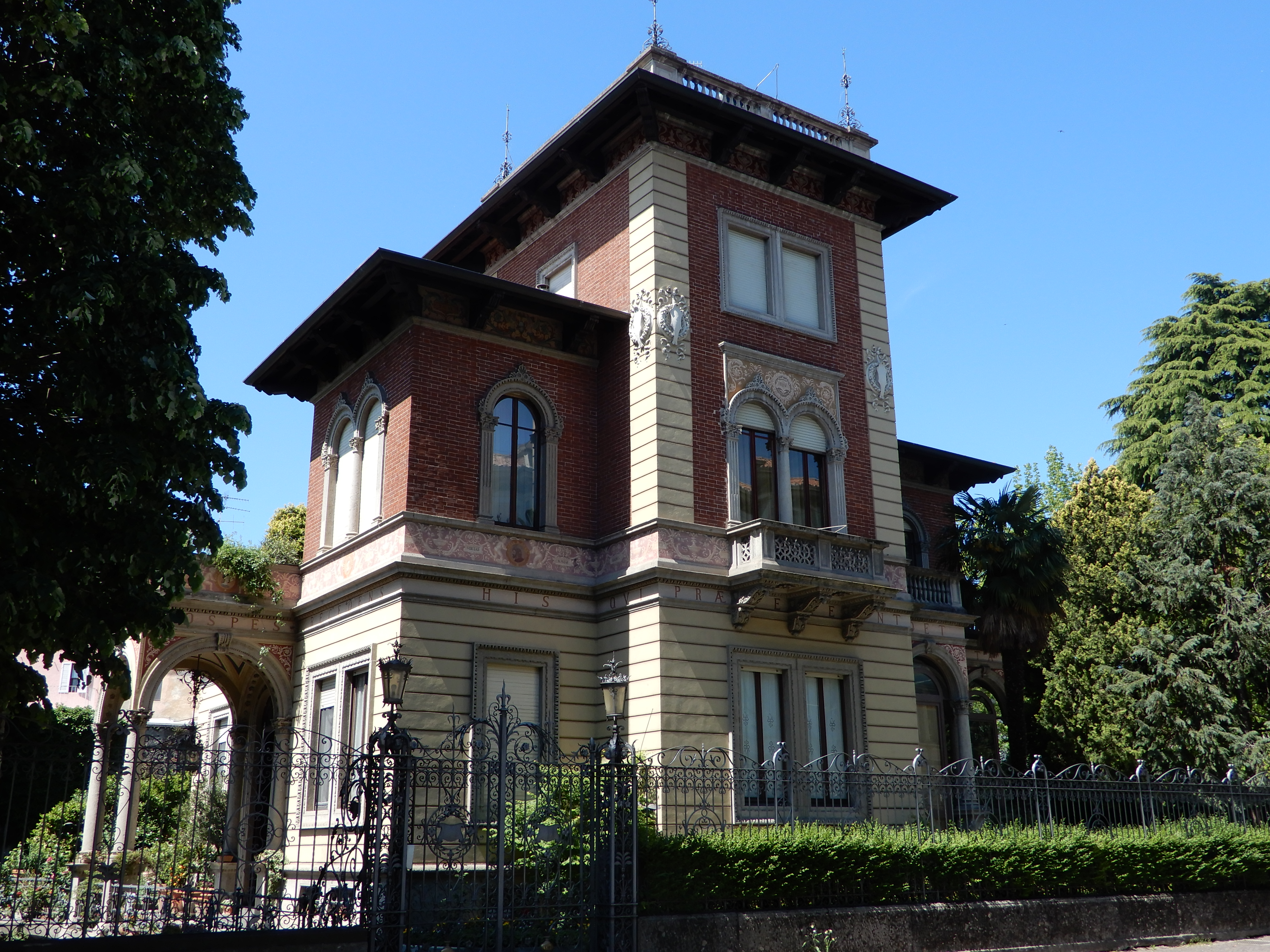 Veduta di Villa Ravera a Ivrea